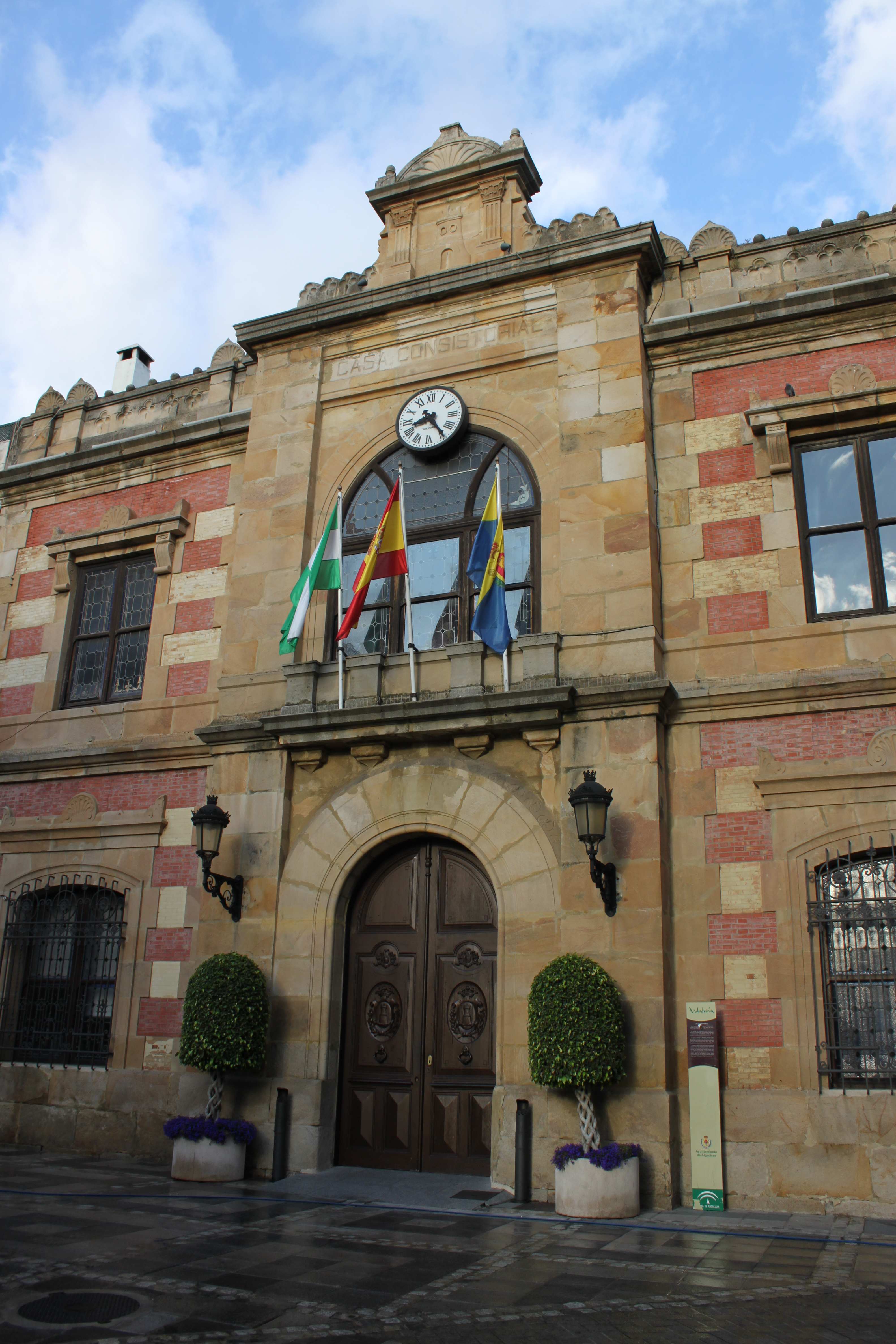 Fachada de la Casa Consistorial de Algeciras en la calle Alfonso XI.